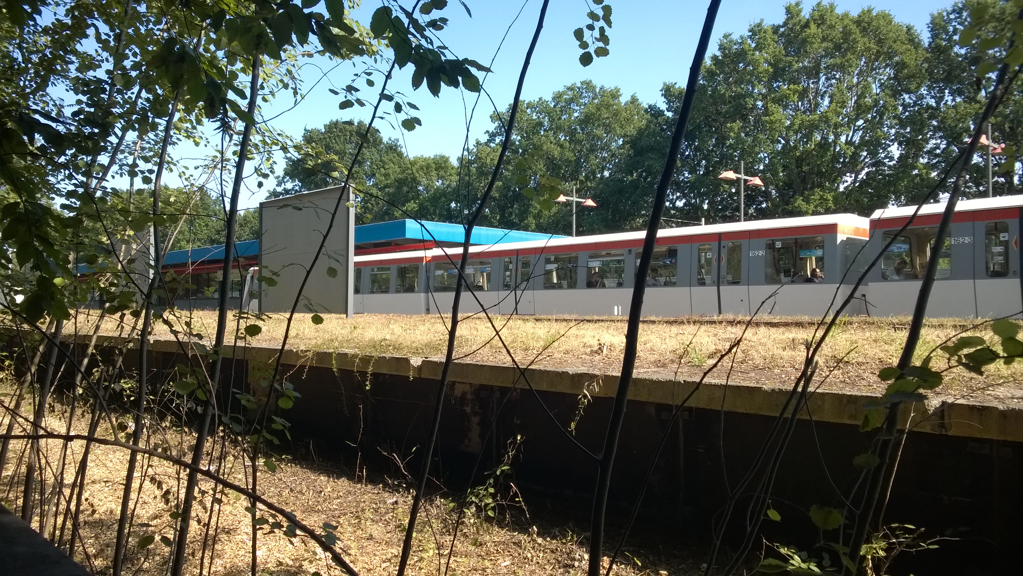 Nie in Betrieb genommener Bahnsteig des U-Bahnhof Sengelmannstraße. Vorleistung für die U4 (alt) und ggf. nutzbar für die U5 (geplant)